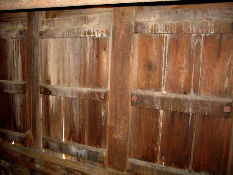 Tannerie Kalpers (Malmedy) : volets du séchoir (1er étage).